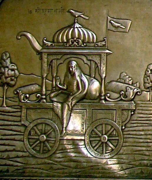 Dhumavati, Jaipur.